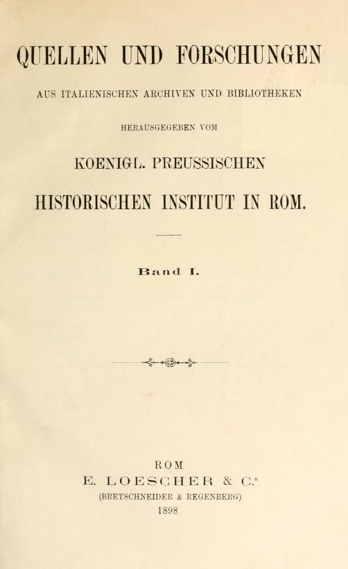 Titelseite der Zeitschrift / Title page of the periodical